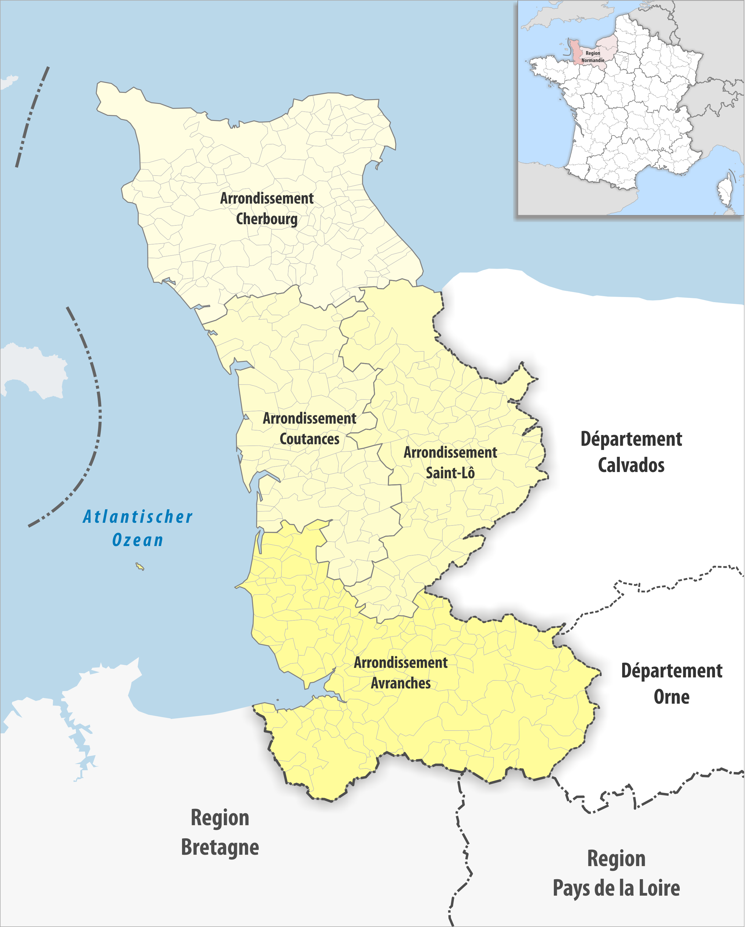 Gemeinden und Arrondissemente im Departement Manche